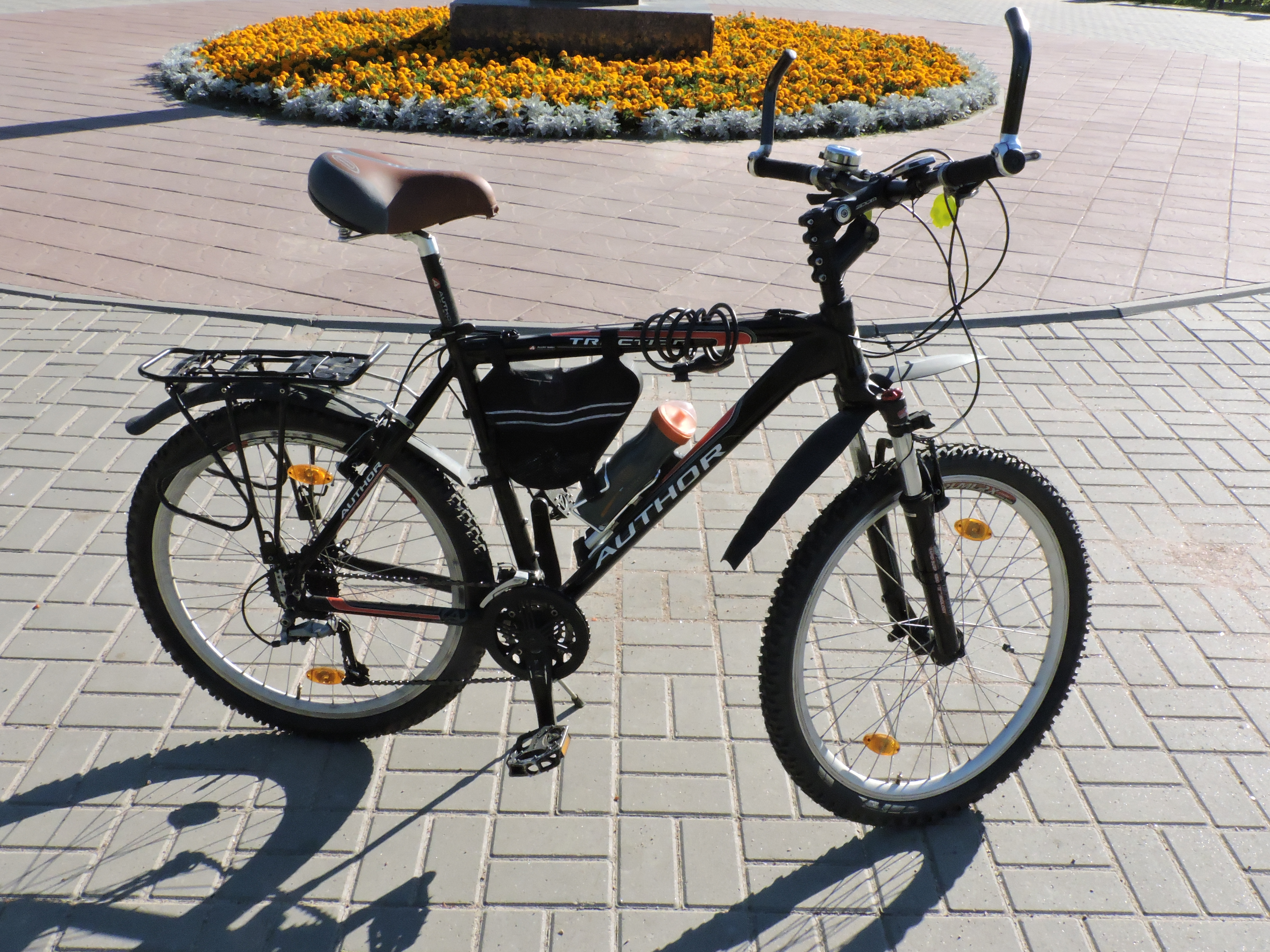 Велосипед-хардтейл «Author Traction»